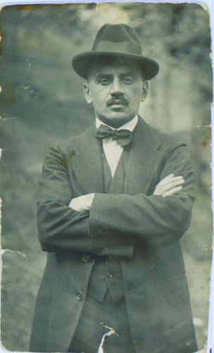 Alojz Gradnik (1885-1967)